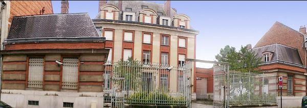 Hotel Banque de France Douai